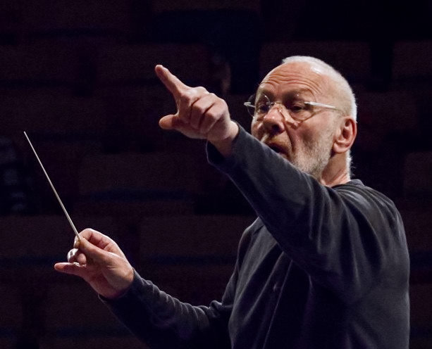 Der österreichische Dirigent, Komponist und Autor Wolfgang Danzmayr bei einem Auftritt im Salzburger "Odeion" im April 2014.